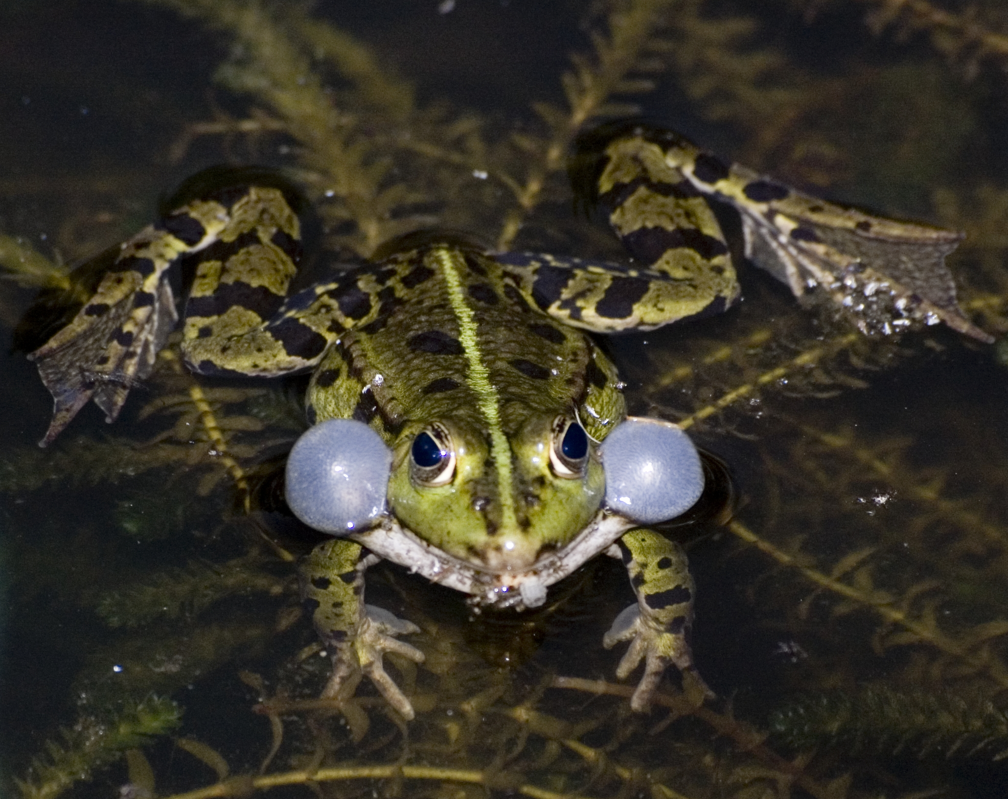 Teichfrosch mit aufgeblasenen Backen